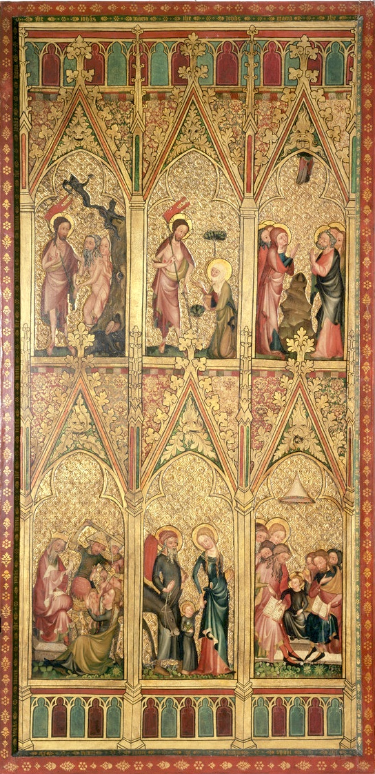 Ouverture des fêtes Volet externe droit, intérieur